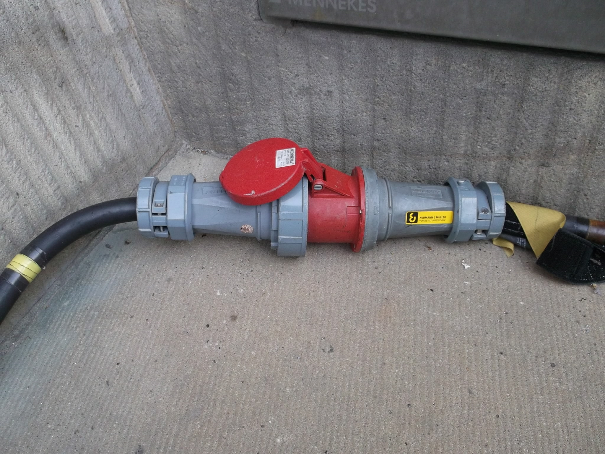 CEE Verbindung 63A 6h 400V IP67 Stromzuführung der Showbühne einer Veranstaltung